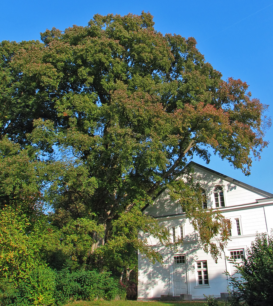 Beschreibung: Feldulme (Ulmus minor, campestris or carpinifolia) / rechts der Marstall von Putbus Fotograf: Darkone, 12. Oktober 2005